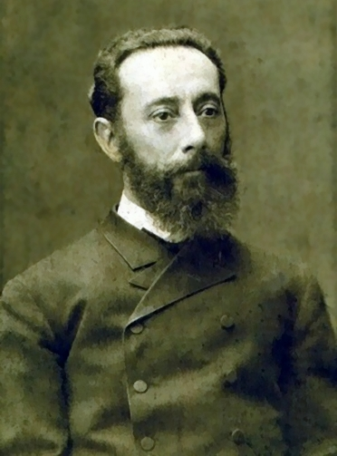 А. А. Иностранцев